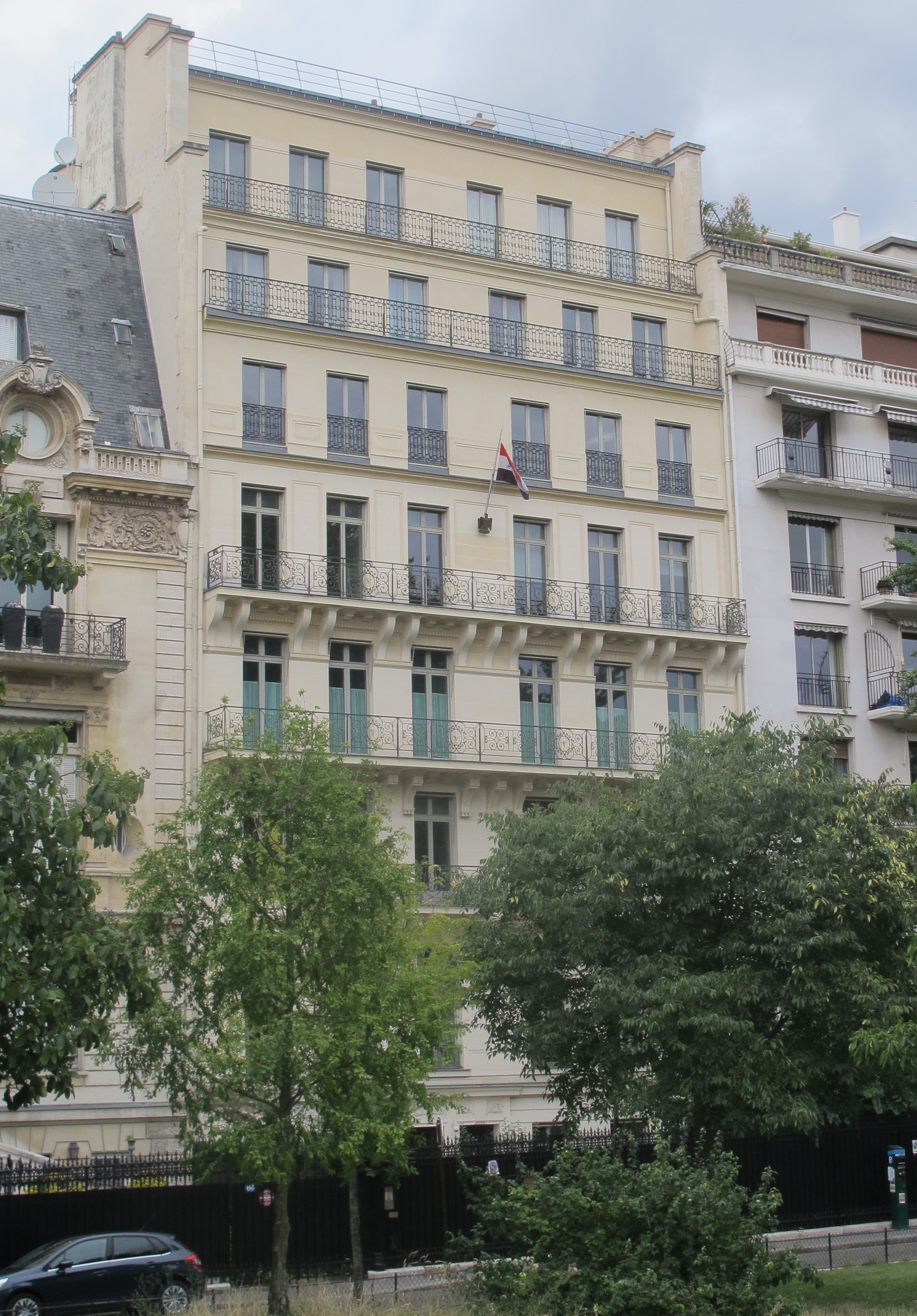 Ambassade d'Irak en France, n°64 avenue Foch (Paris, 16e).